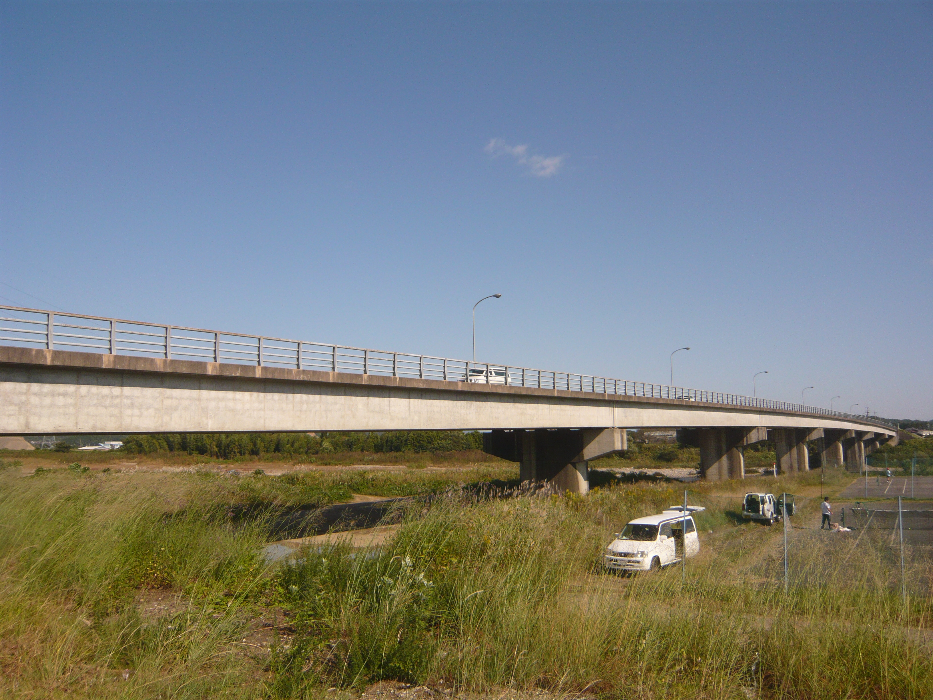 Giseki-Ohashi(岐関大橋),Gifu,Gifu,Japan(岐阜県岐阜市)で右岸下流より撮影。